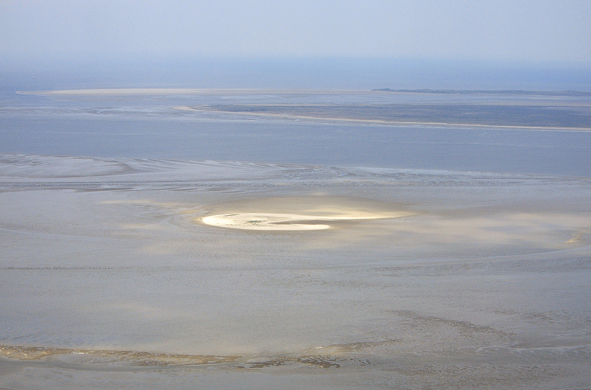 Lütje Hörn im Jahr 2008 (im Hintergrund Memmert und die Westspitze von Juist)